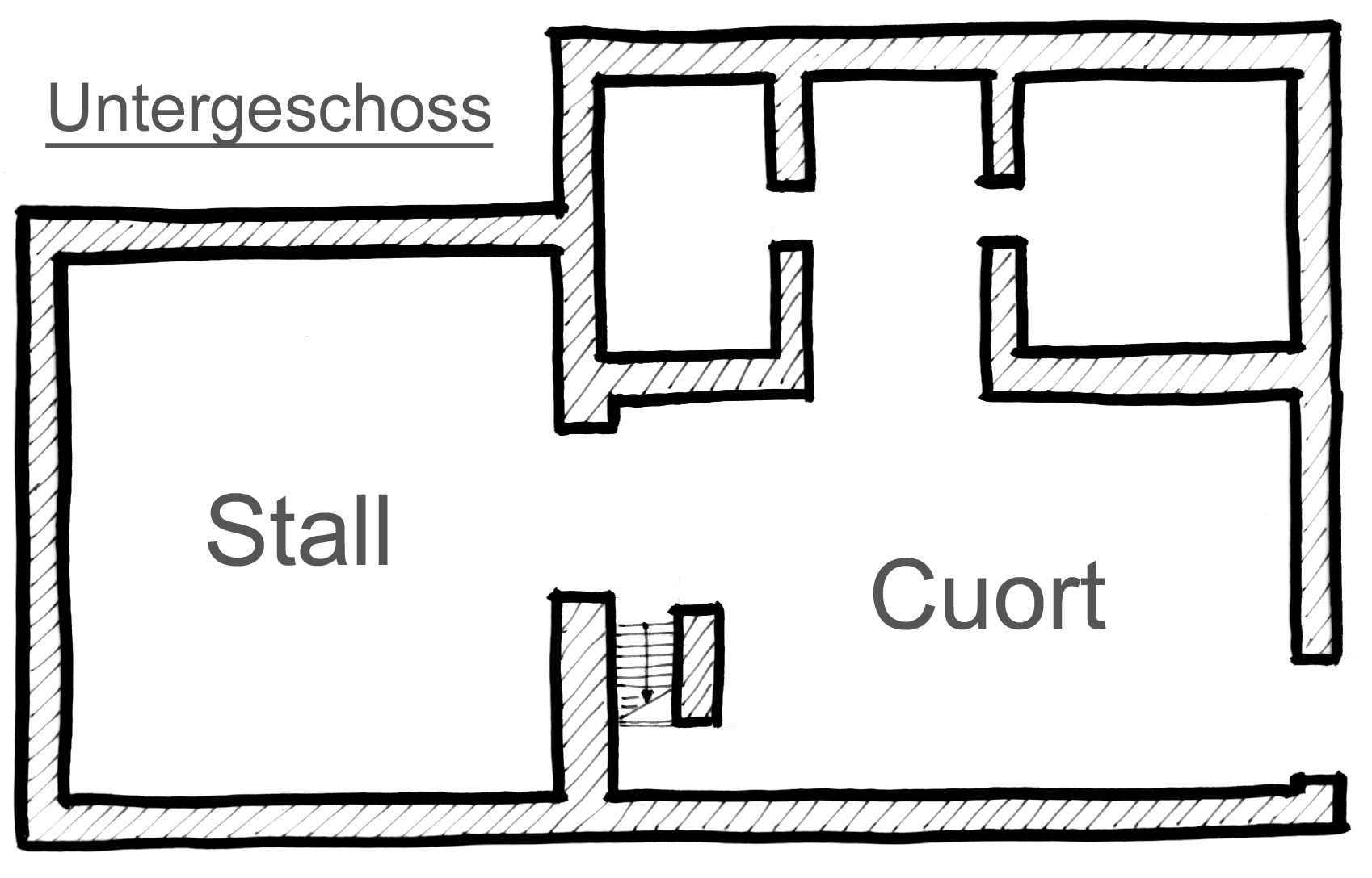 Grundriss des klassischen Engadiner Bauernhauses im Untergeschoss